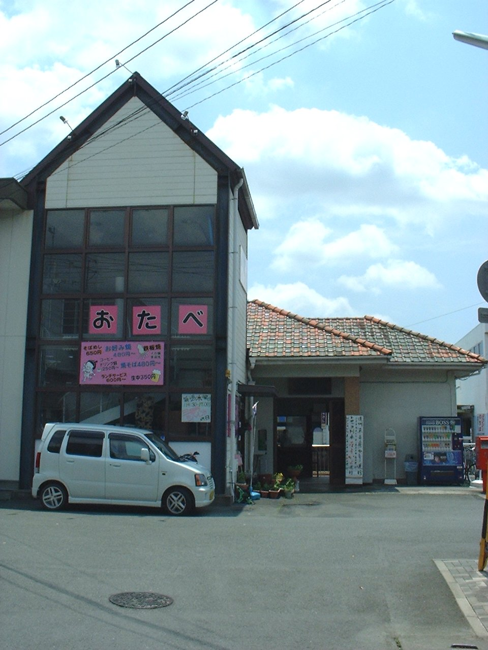 金指駅 駅舎 2005年5月26日 Bakkai撮影